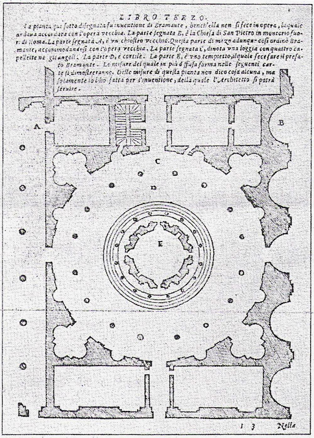 Houtsnede van platteground van Tempietto.